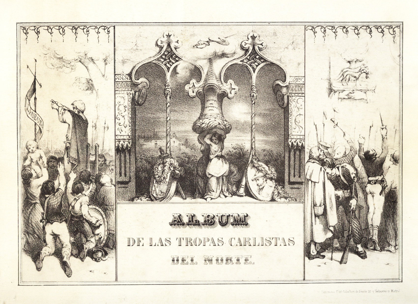 Portada. "Álbum de las Tropas Carlistas del Norte". Madrid, sin fecha. (184?)